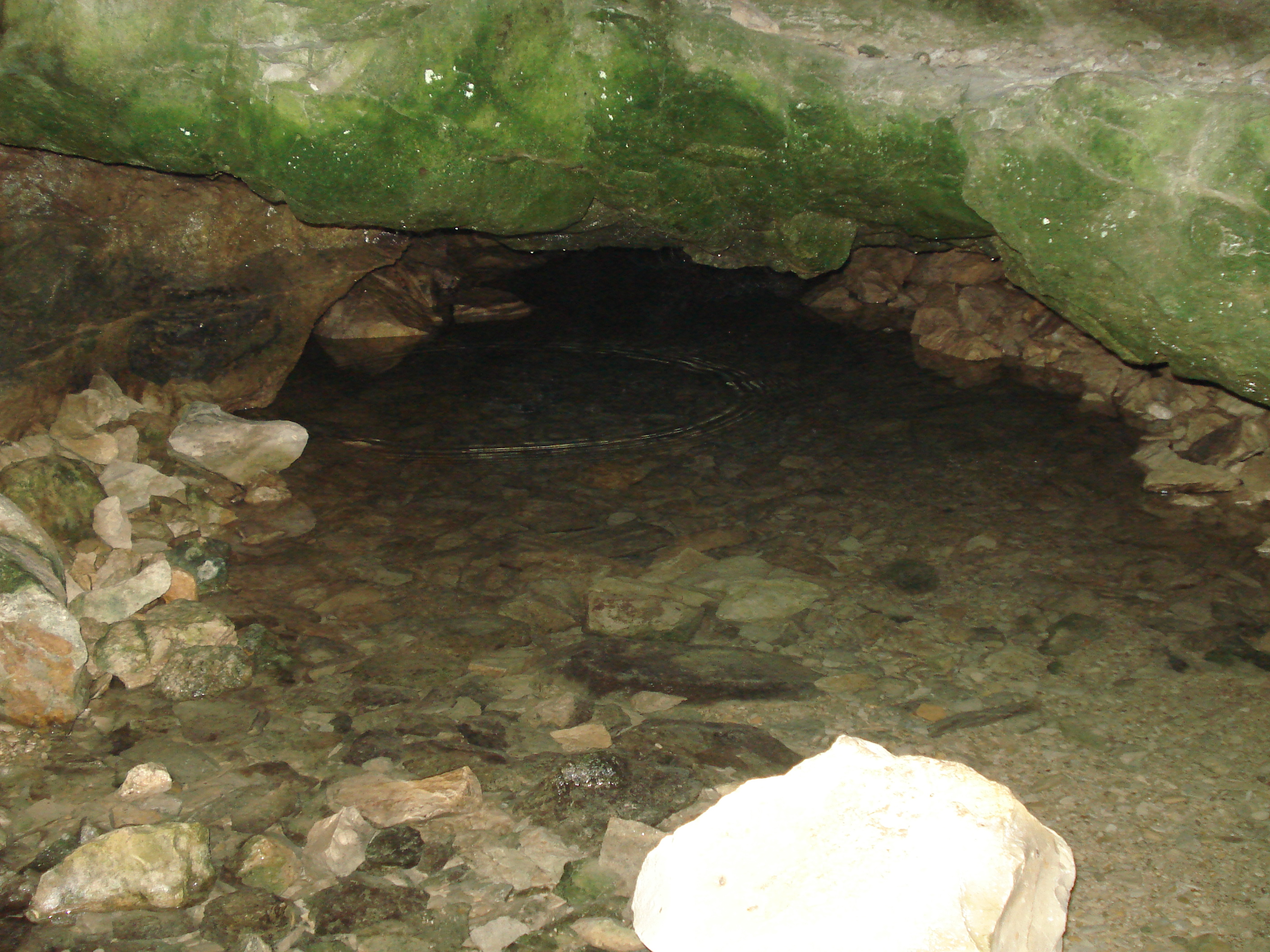 Aktive Karstwasserhöhle. Der Bach entfließt dem Eingangsportal der Wulfbachquellhöhle.